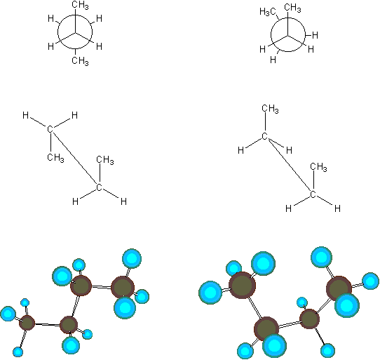 GNU-FDL, selbst erstellt